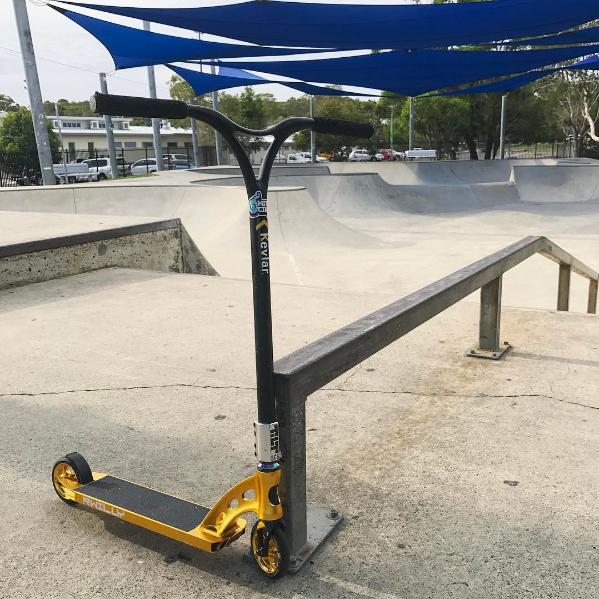 Trottinette MGP de Ryan Williams